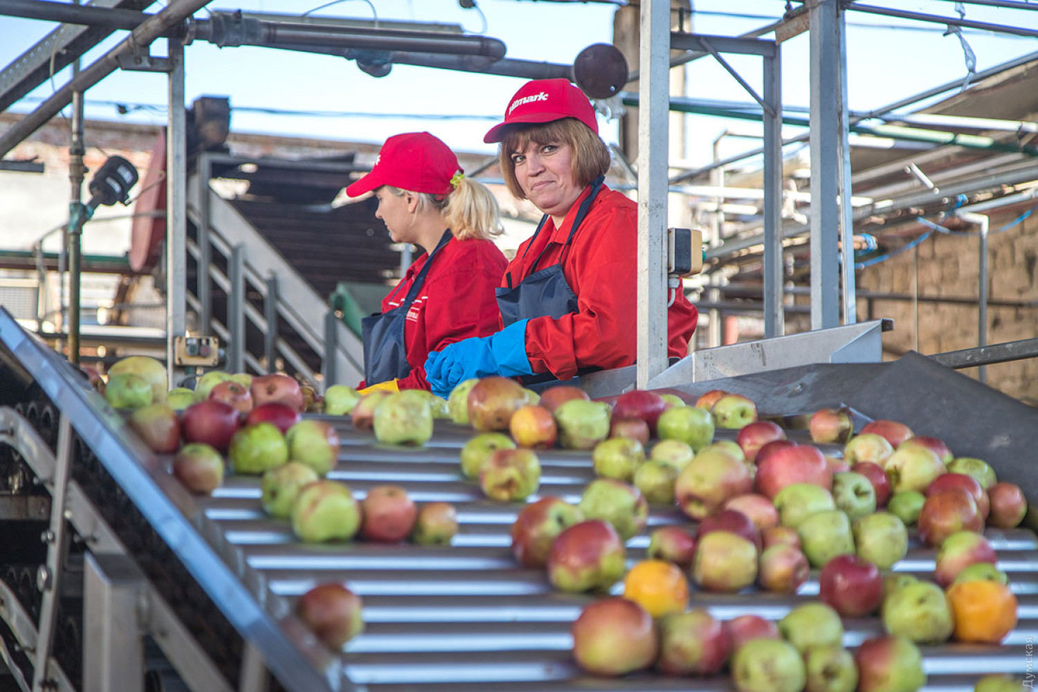 Линия сортировки и контроля